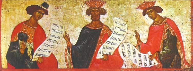 Даниил, Давид и Соломон Школа или худ. центр: Новгород